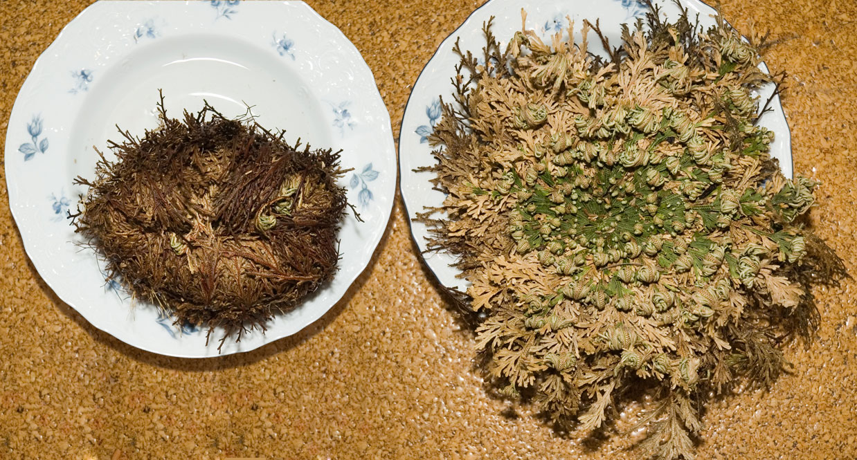 Růže z Jericha vlevo v suchém stavu, vpravo cca 6 hodin po zalití vodou.